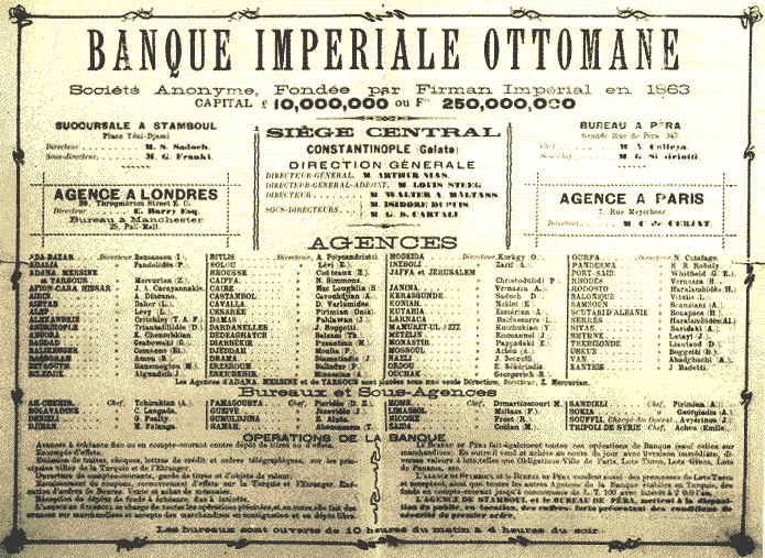 Fransız ve İngiliz ortakların sermayesiyle kurulan Osmanlı Bankası kuruluş sözleşmesi.